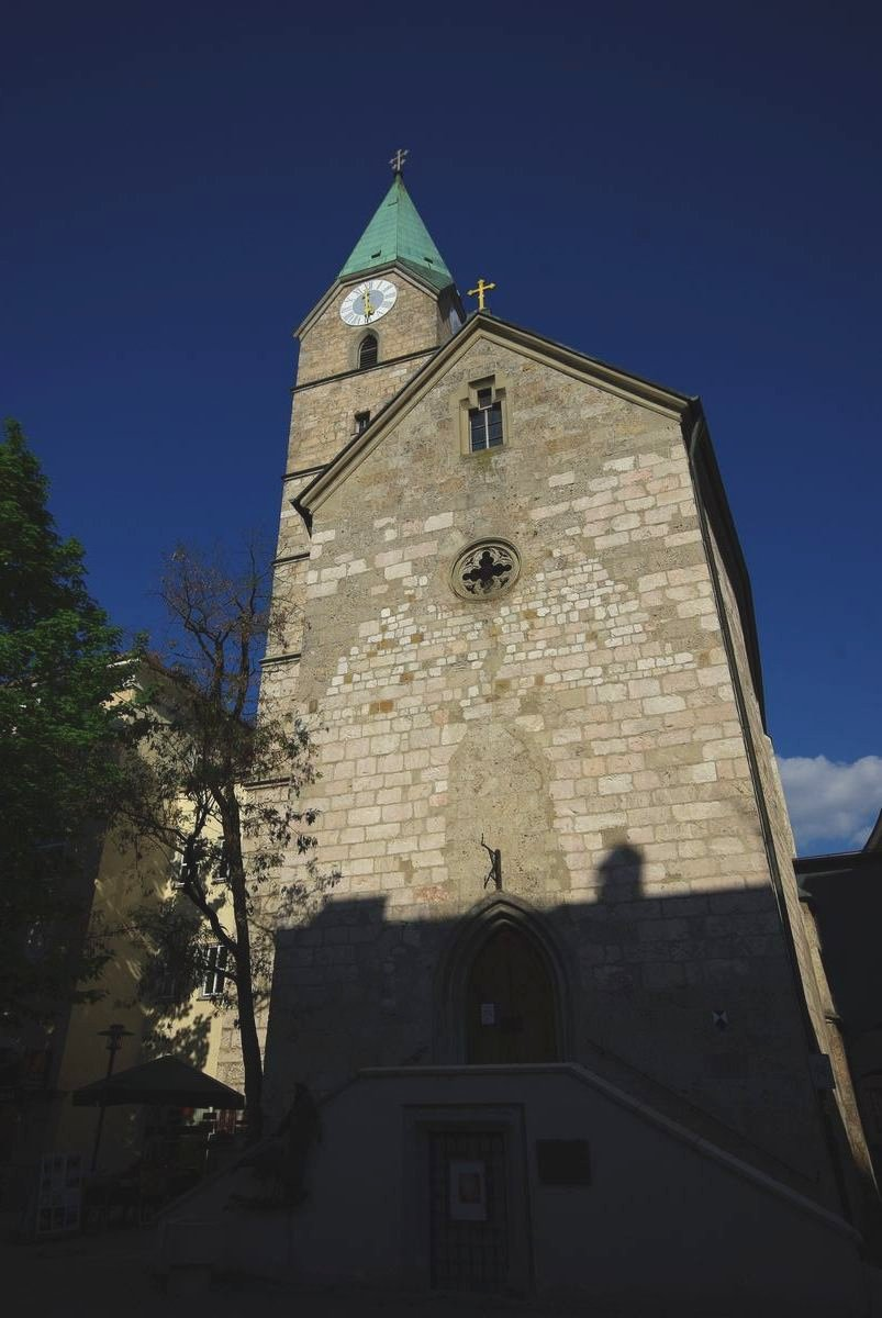 Kirche St. Ägidi, Bad ReichenhallThis is a photograph of an architectural monument.